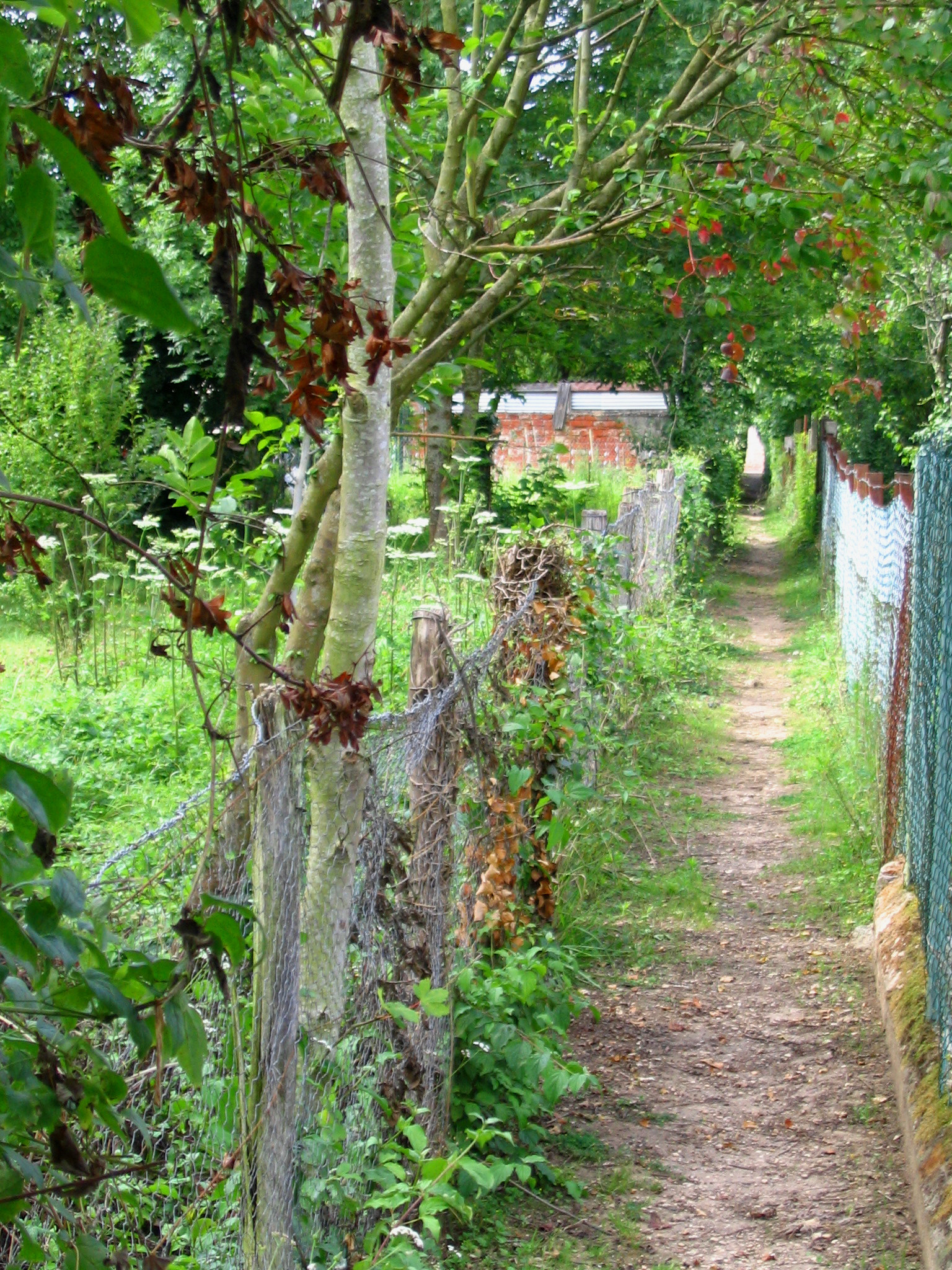 Jardins bateliers de Saint-Mammes - Seine et Marne - France